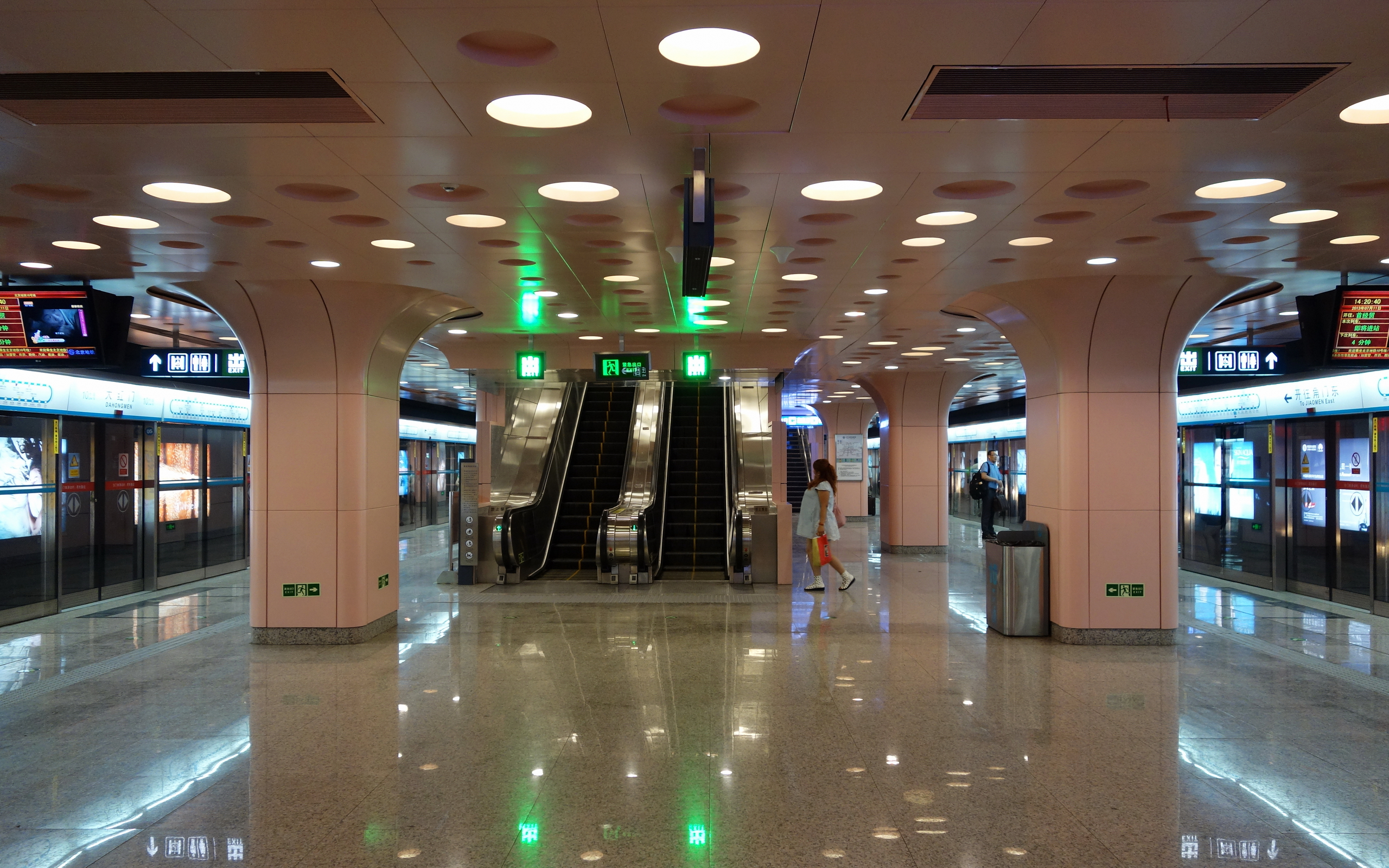 地铁10号线大红门站岛式站台